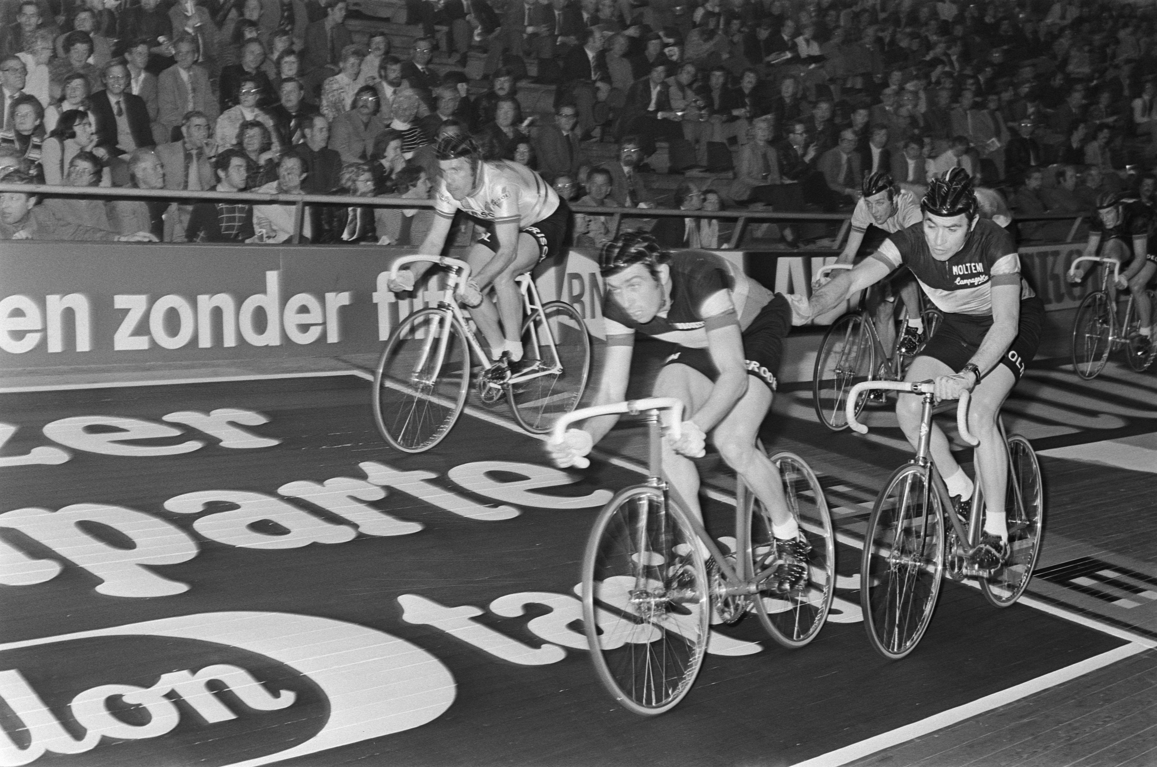 Collectie / Archief : Fotocollectie Anefo Reportage / Serie : [ onbekend ] Beschrijving : Wielerzesdaagse gestart in Ahoyhal, Rotterdam; het koppel Merckx en Sercu Datum : 22 januari 1976 Locatie : Rotterdam, Zuid-Holland Trefwoorden : wielrennen Persoonsnaam : Merckx, Eddy Instellingsnaam : Ahoy Fotograaf : Mieremet, Rob / Anefo Auteursrechthebbende : Nationaal Archief Materiaalsoort : Negatief (zwart/wit) Nummer archiefinventaris : bekijk toegang 2.24.01.05 Bestanddeelnummer : 928-3758